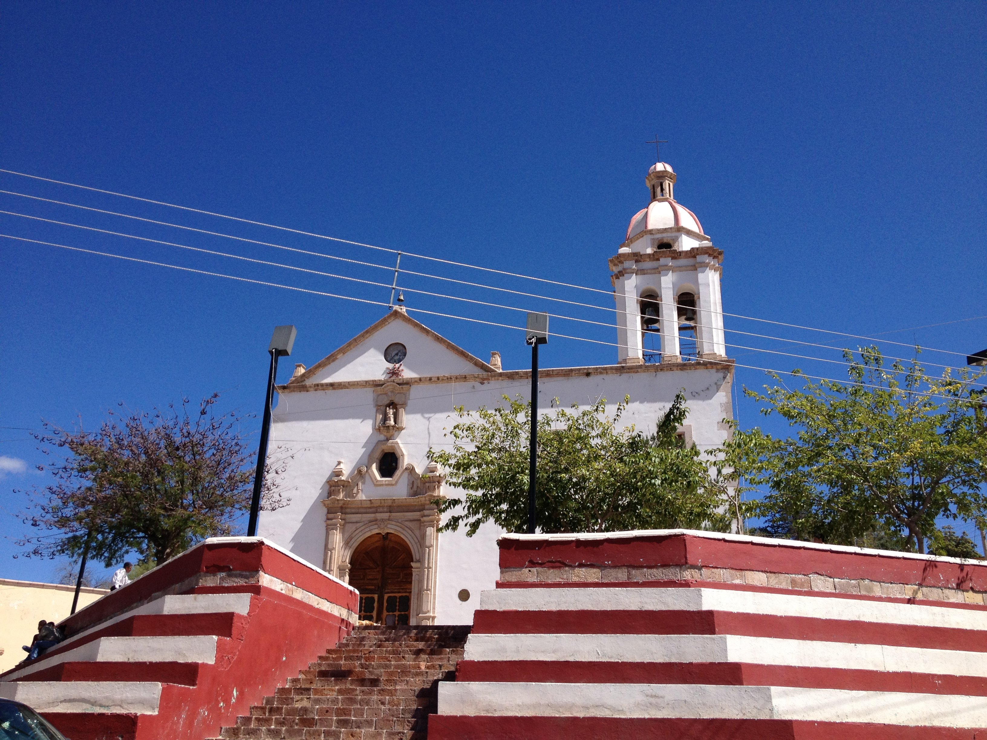 Templo de Santa Eulalia en el pueblo del mismo nombre, municipio de Aquiles Serdán, Chihuahua